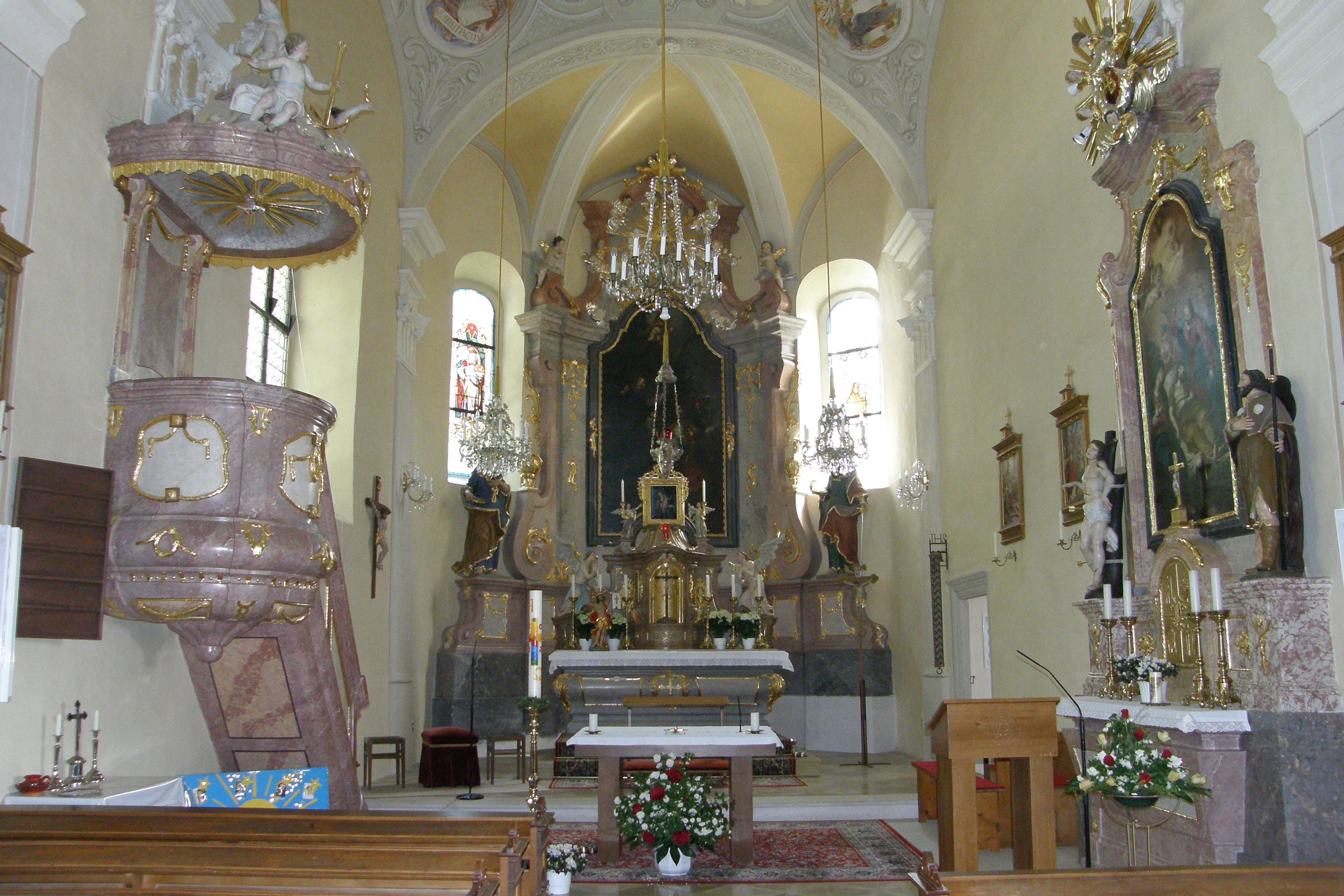 Kath. Pfarrkirche hl. Ägidius